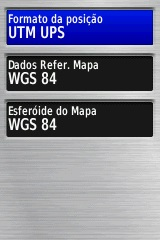 Tela para seleção de Sistema de Coordenadas e Datum GPS Garmin GPSMAP 62s